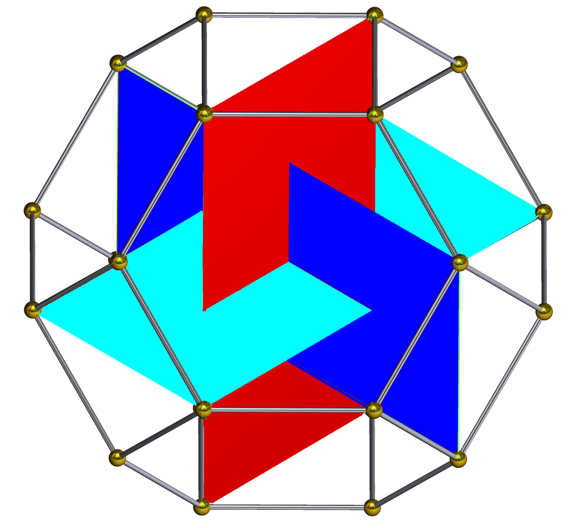 Peudoicosahedron